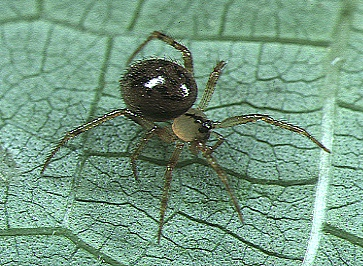 female Dipoena mustelina from Okinawa.